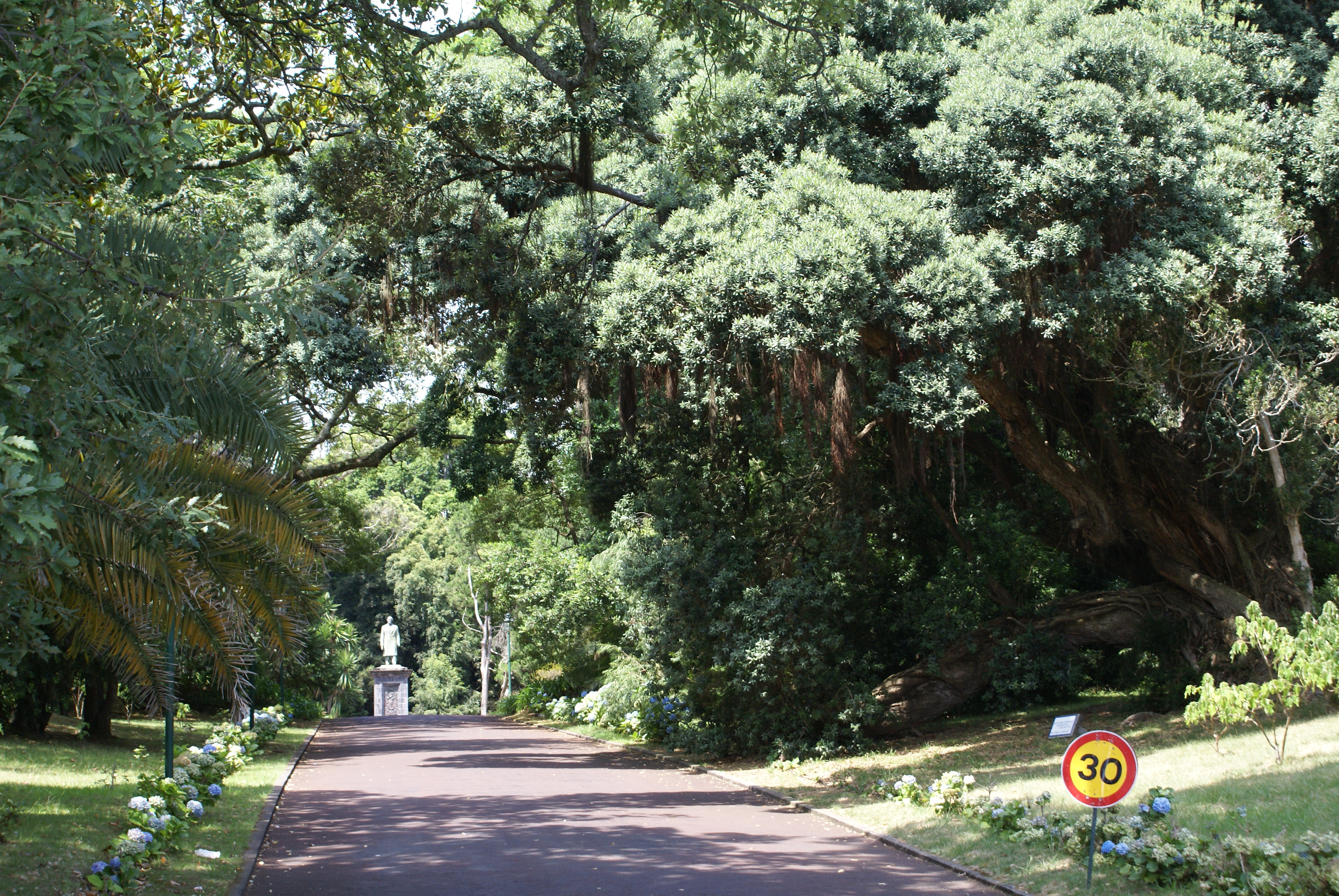 Jardim José do Canto, Ponta Delgada, ilha de São Miguel, Açores